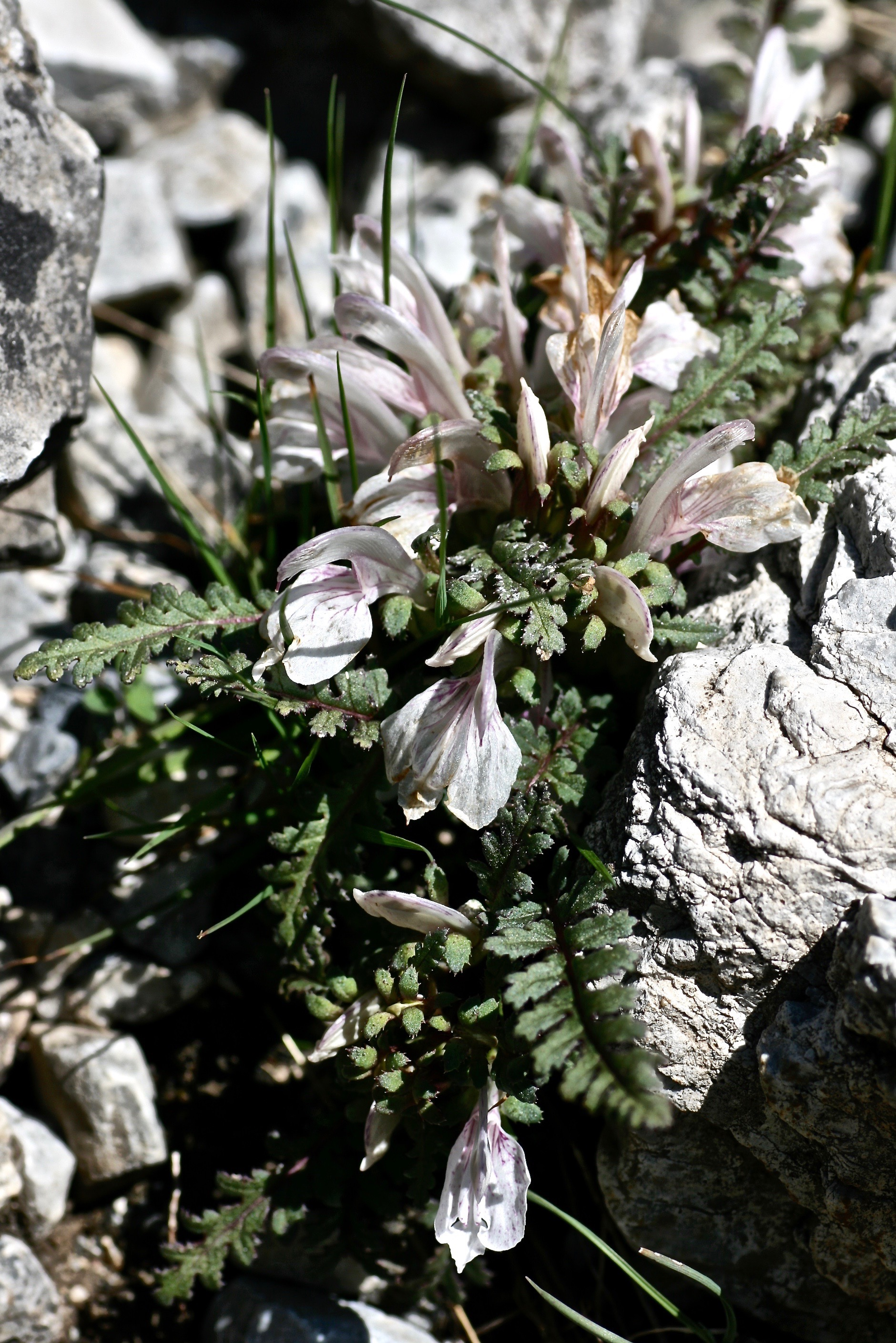 Kyrgyzstan, Alay mts., Suu-Bashi, along Allauddin river. 2700 m. Rus: Кыргызстан, Баткенская обл., Кадамжайский р-н, 20 км на ЮВ от г. Айдаркен, Алайский хр., урочище Суу-Баши, берег р. Аллауддин, 2700 м н.у.м. 29 июня 2009 г.